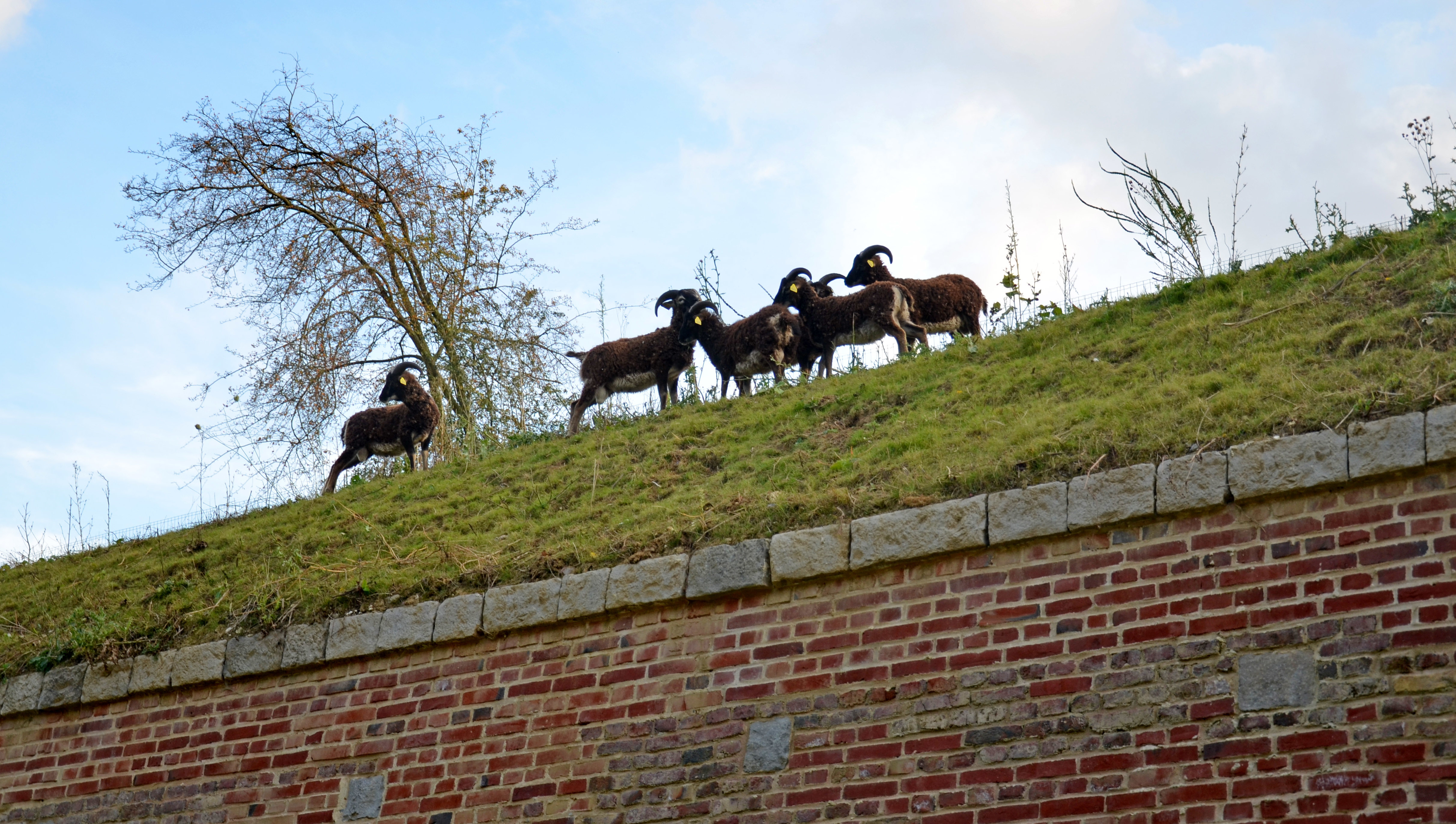 Moutons de Soay utilisés par la ville de Lille pour la gestion restauratoire de la végétation couvrant le sommet d'une partie des fortifications (citadelle de Lille, construite par Vauban). Ce petit mouton, léger et rustique, très à l'aise sur les pentes remplace idéalement les engins mécaniques. Il joue aussi un rôle de corridor écologique ambulant en transportant des graines et propagules dans son pelage, son tube digestif et sous ses sabots. Urban grazing and ecopastoralism on a historical monument, provided by Soay sheep, which provide restorative and differentiated management of the vegetation covering the fortifications of Lille. This small sheep, light and hardy, at ease on slopes, is an ideal replacement for machines, while playing a role of an ecological corridor by carrying seeds and propagules in its coat, its digestive tract and under its hooves.